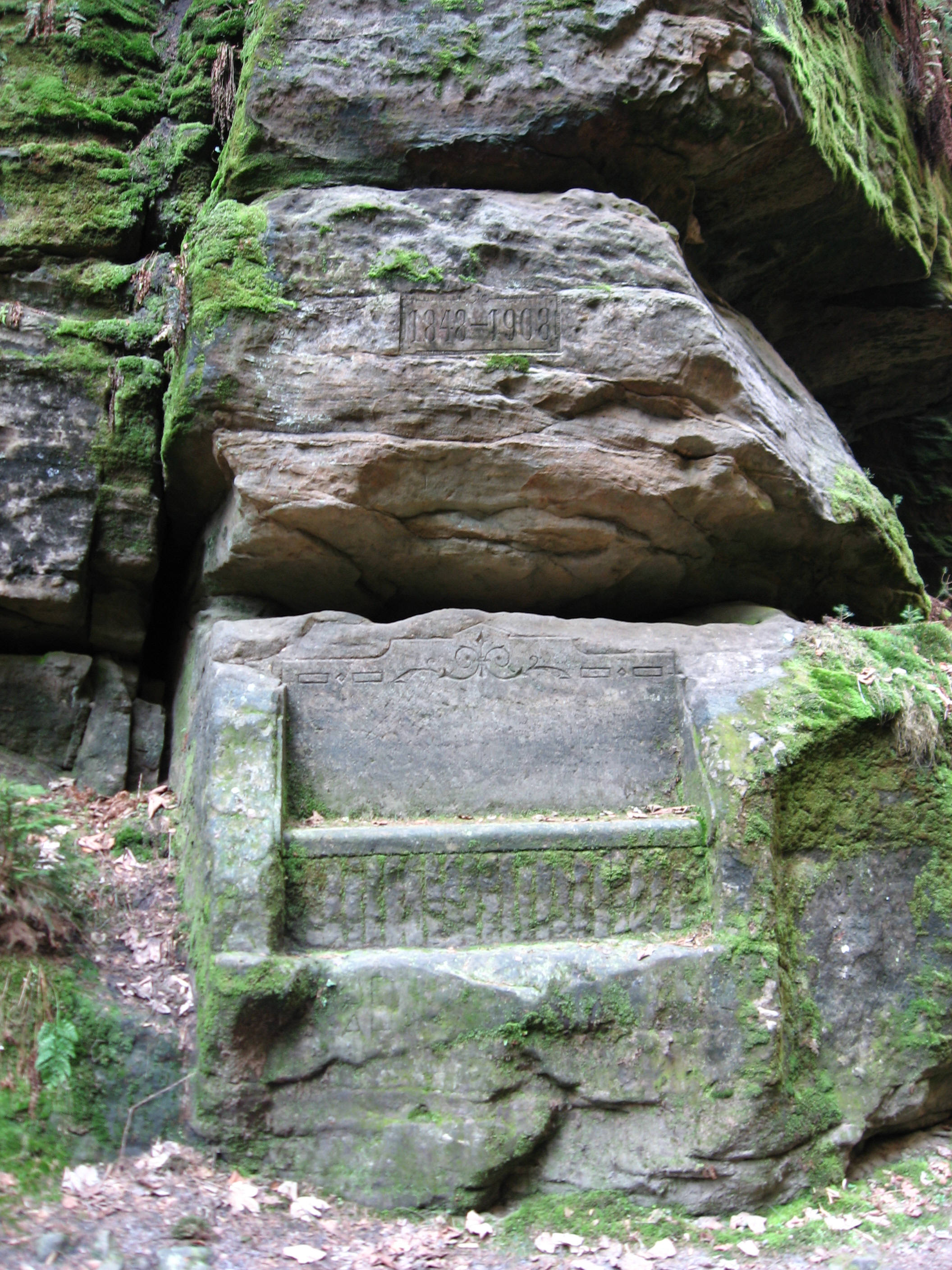 Dürrkamnitz_Steinbank